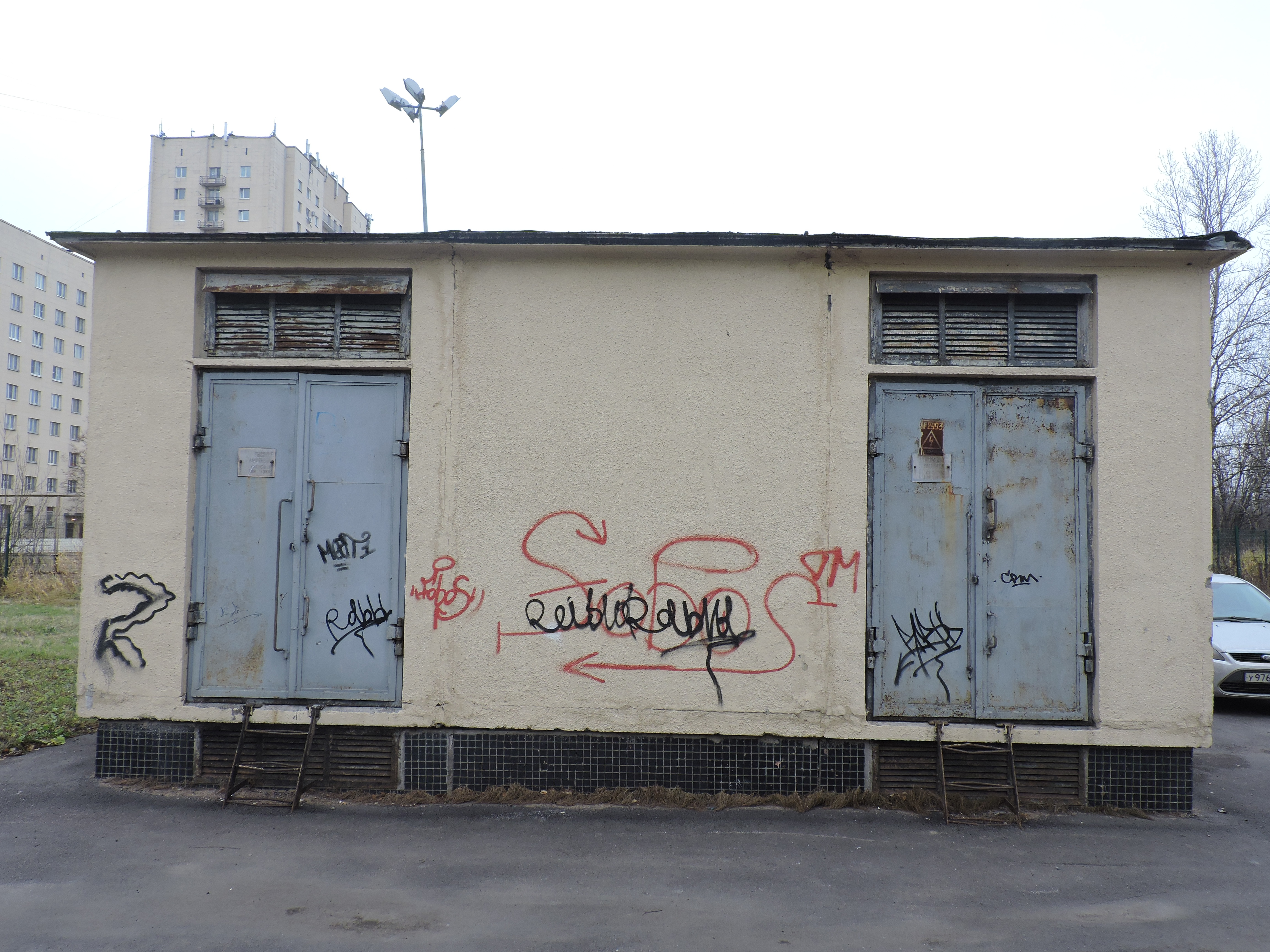 Трансформаторная будка (мини-подстанция)